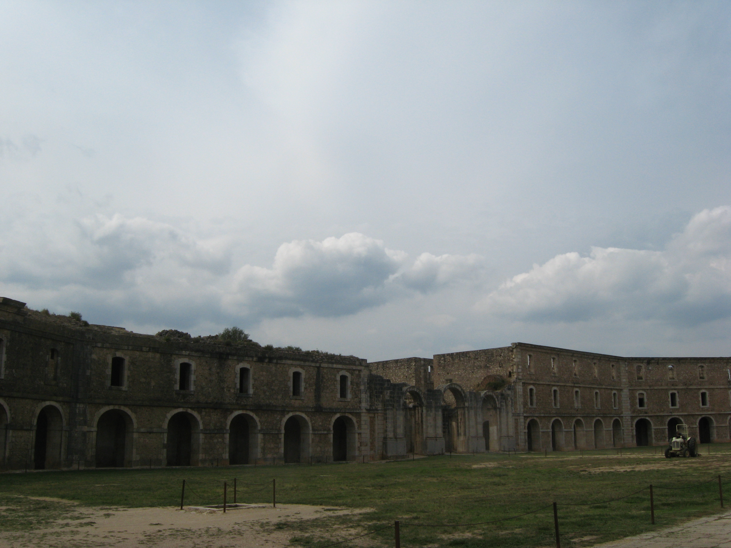 Das Kastell von Sant Ferran (Figueres/Katalonien) Datum: 16.09.2010 Urheber: Michael Pfeiffer alias Benutzer:Gordito1869 Quelle: privates Fotoarchiv des Urhebers